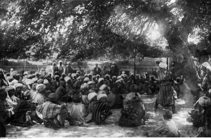 Friedrich Sarre Buchara. Der Märchenerzähler. Foto: Friedrich Sarre, 1898